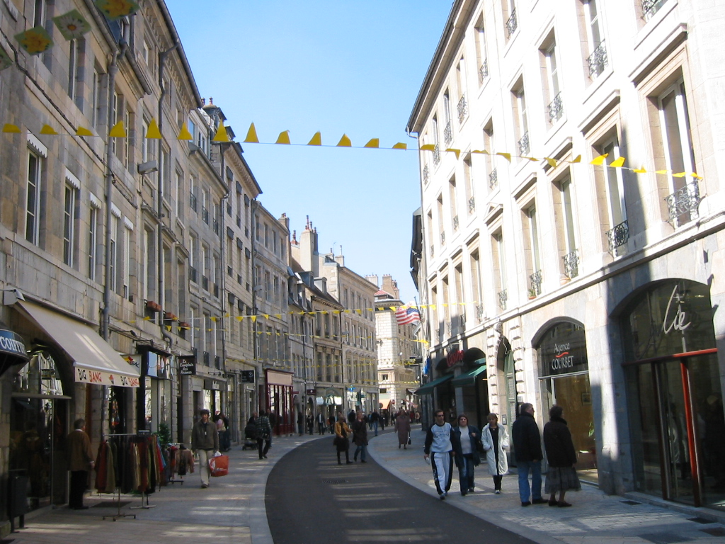 Seconde rue principale du centre de Besancon ( Rue des Granges )